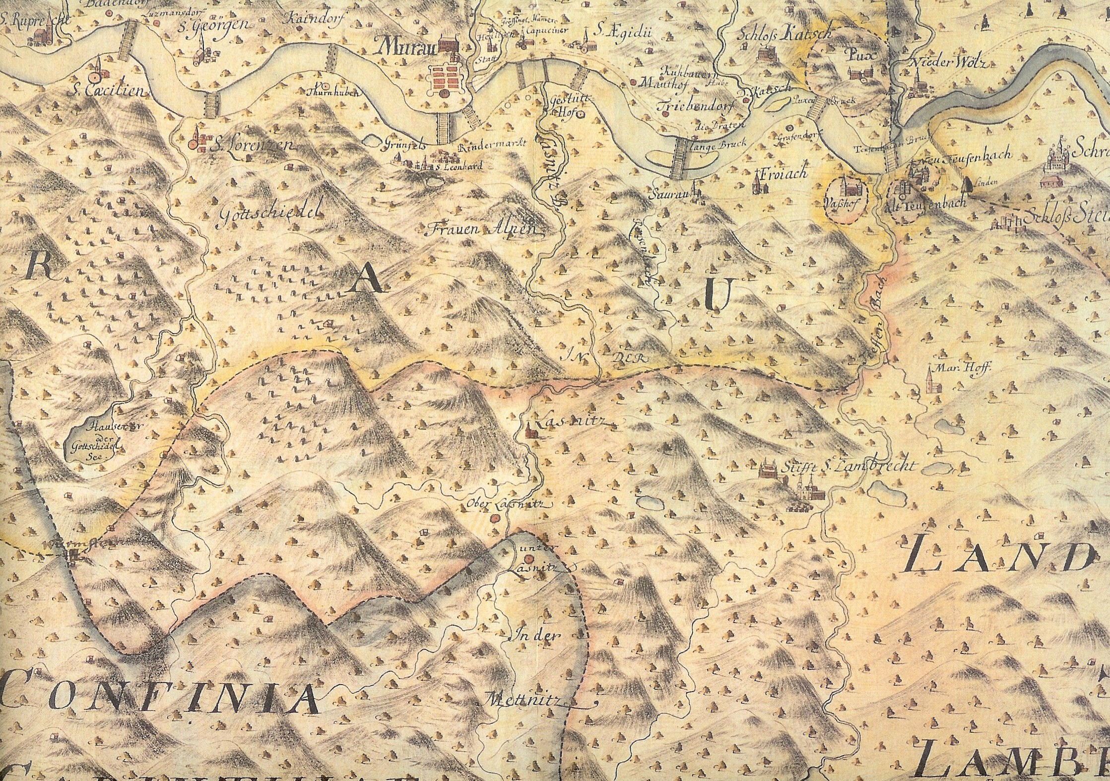 Die Laßnitz bei Murau und ihre Umgebung 2. Hälfte des 18. Jahrhunderts.